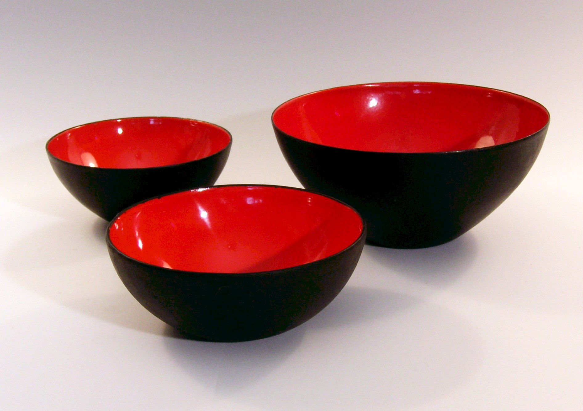 Herbert Krenchels Krenit-skålar i röd